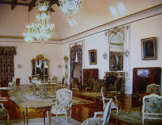 Salón de los Espejos, también llamado Salón Principal, ubicado en el ala norte del Palacio de Njas, Quito (Ecuador).